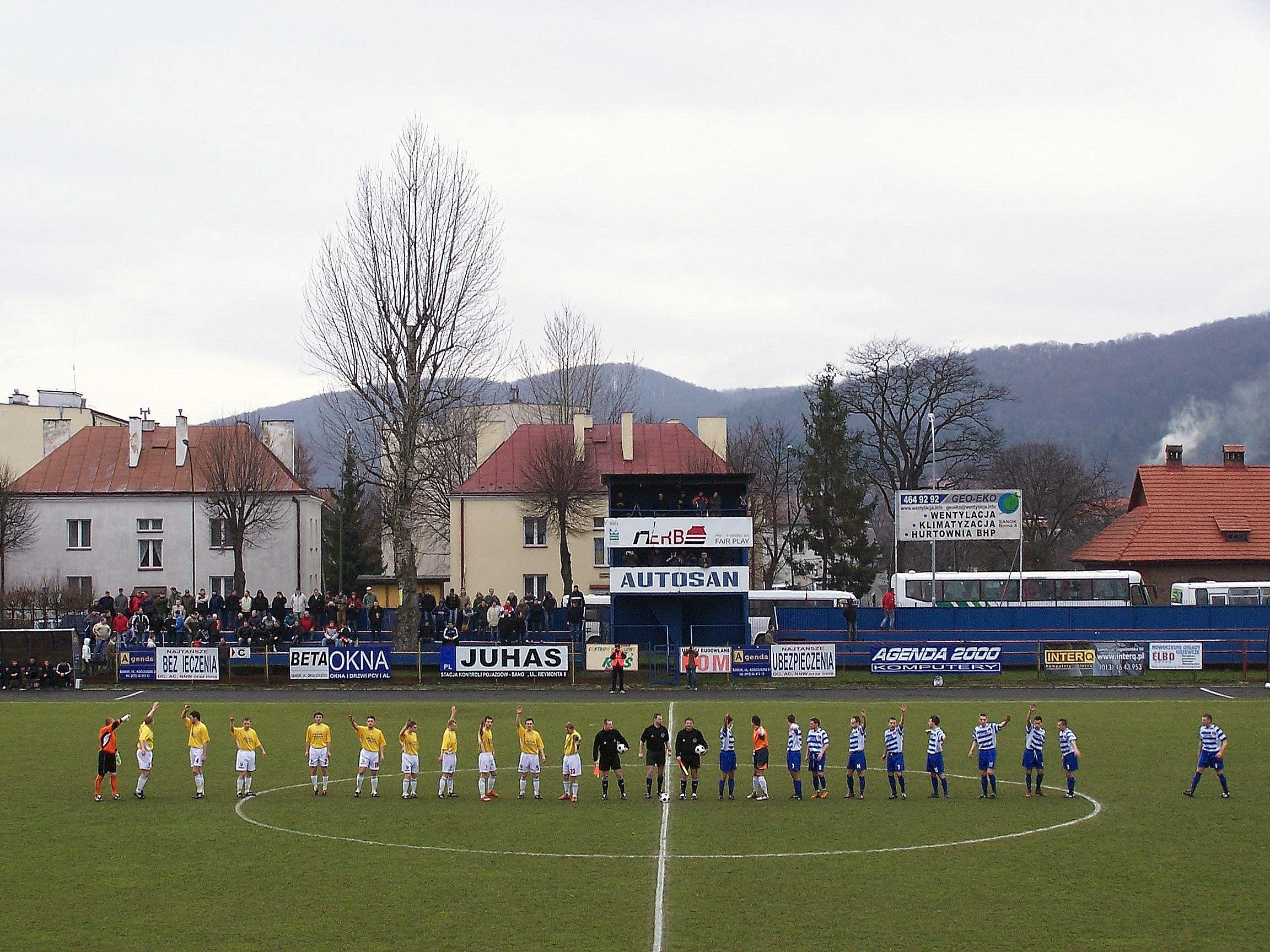 Stal Sanok - Karpaty Krosno 15 marca 2008 (Sanok)